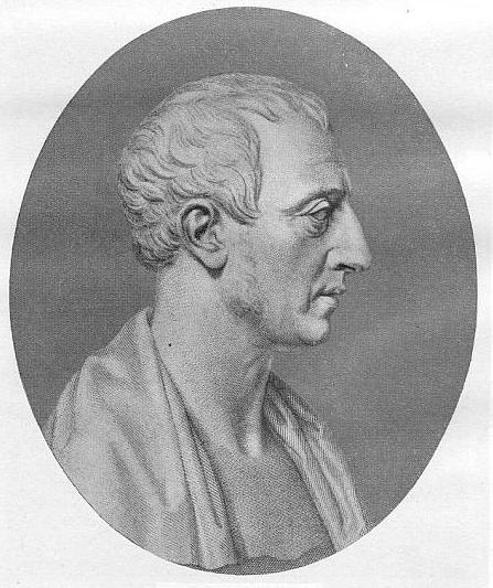 Bartolomeo Borghesi (1781–1860), italienischer Numismatiker und Epigraphiker. Stich von Hée, nach einer Büste von M. Wolf (aus Oevres complplètés, Bd. 1).